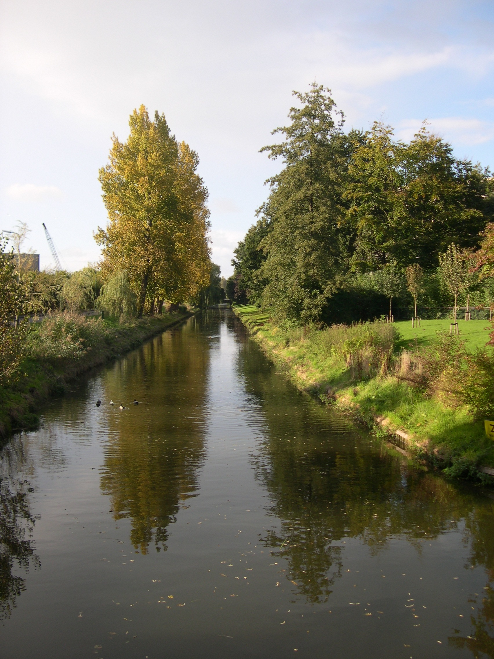 De Grift ter hoogte van zwembad "De Vallei" in Veenendaal. Foto: Magalhães, 2 oktober 2005